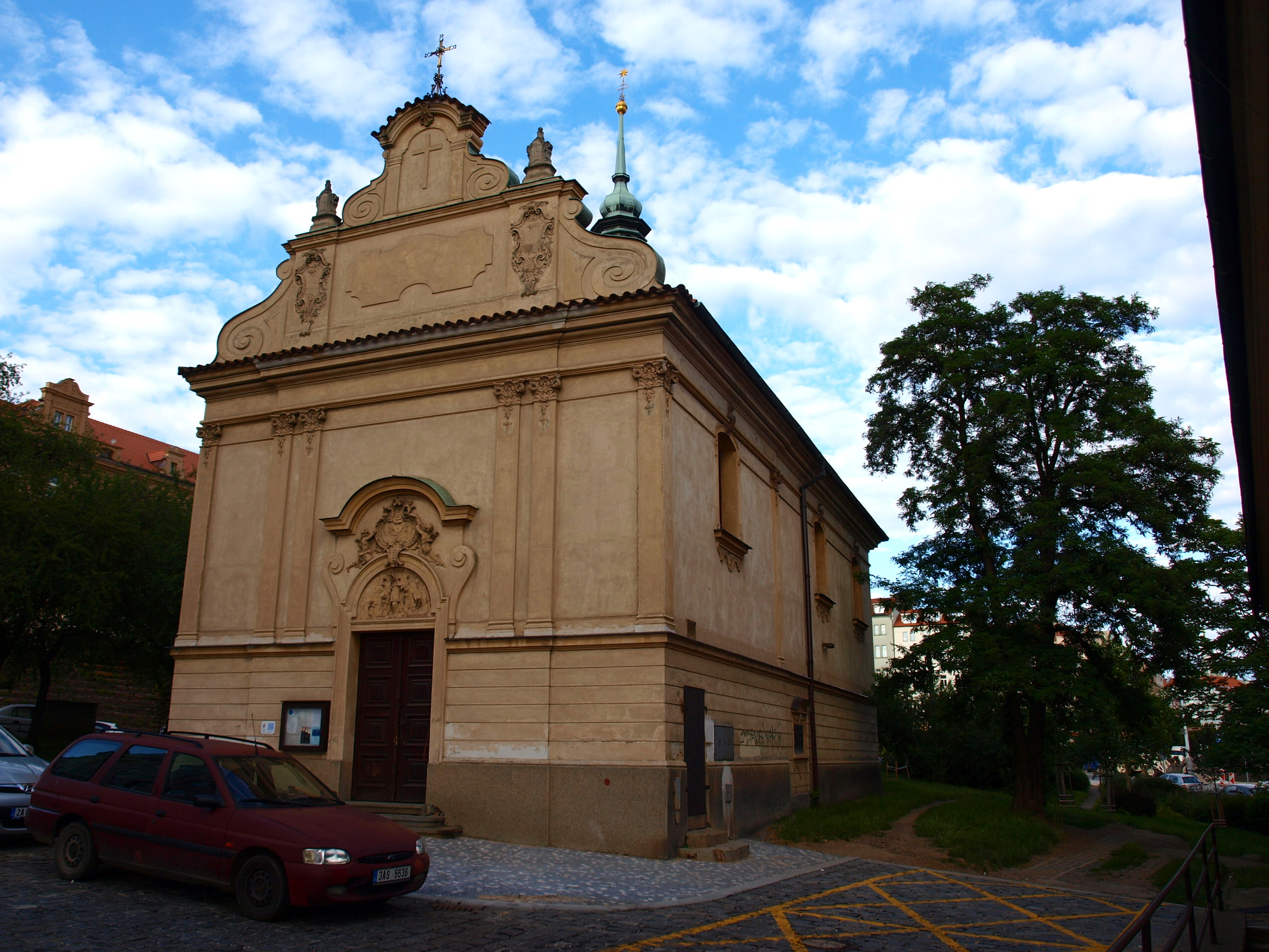 Vršovický Mikuláš